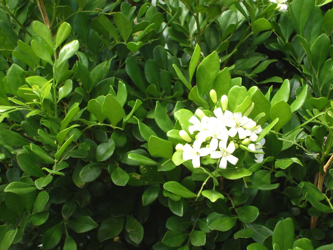 Murraya paniculata (ʻolive) on Tongatapu